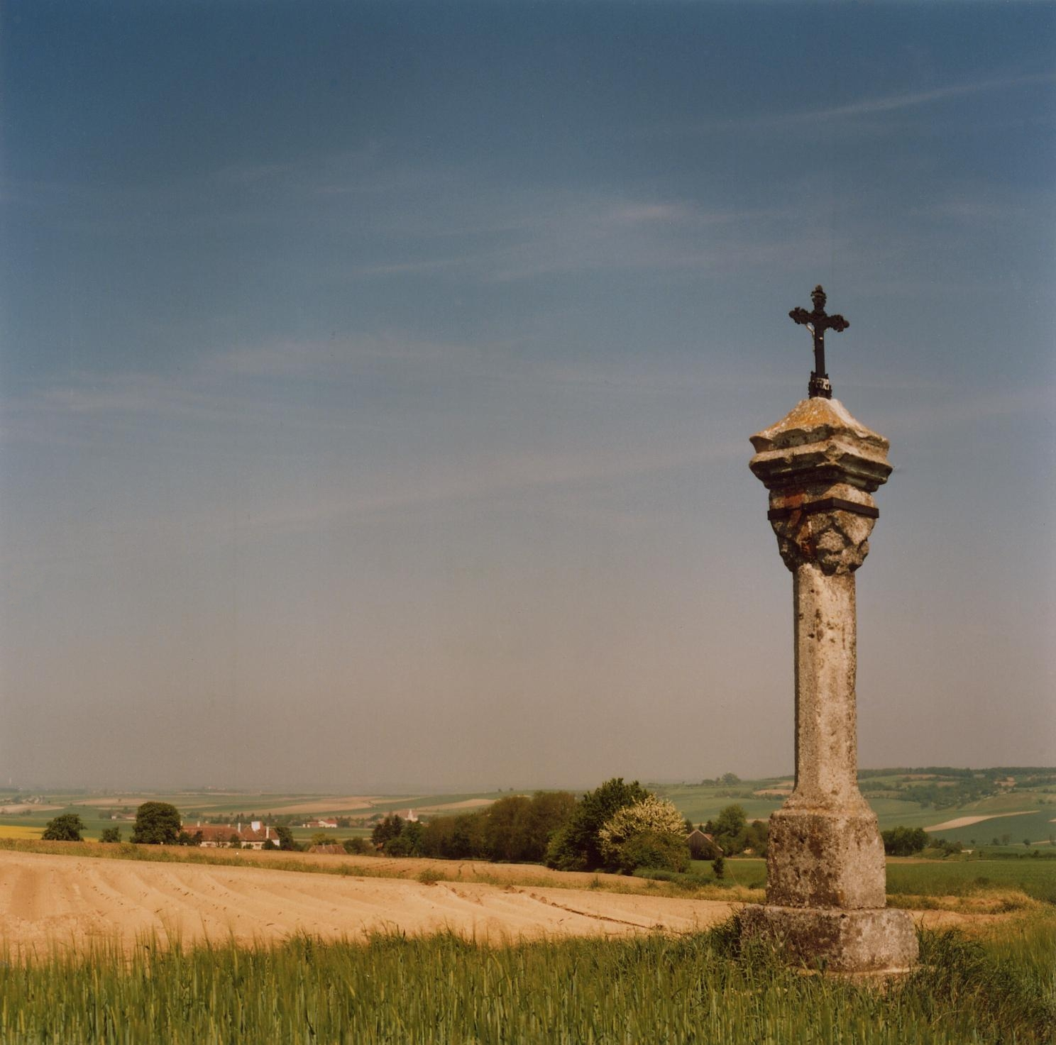 Follykreuz bei Weyerburg